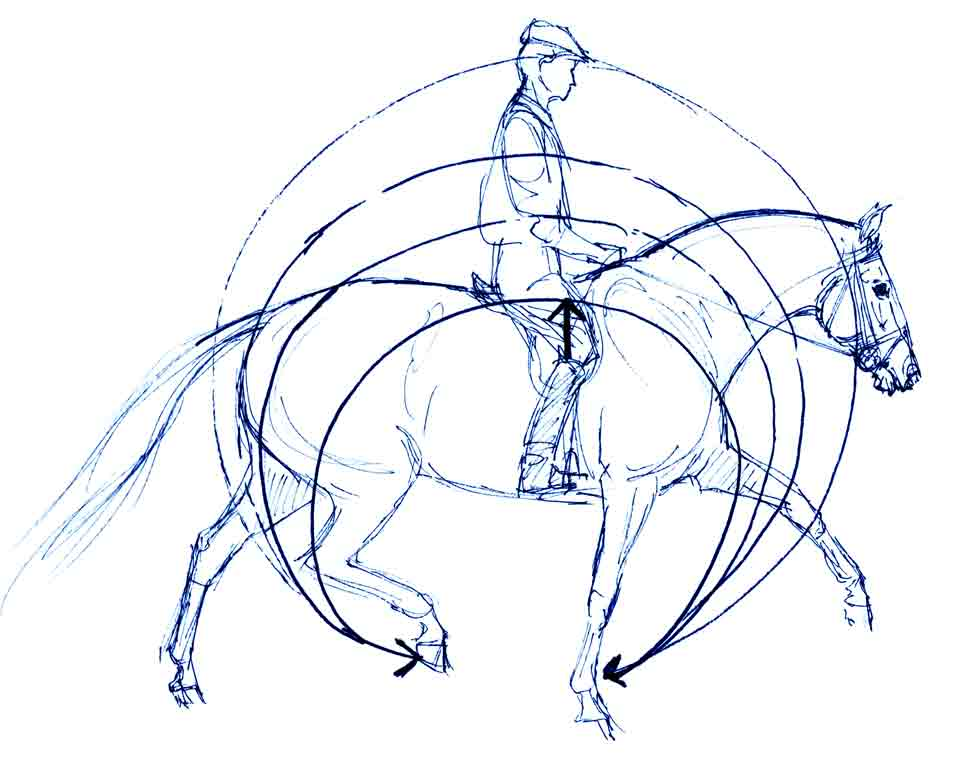 Wellenbewegung mit Reiter. Aufbau des Sattels darf dieser Bewegung nicht entgegen wirken.